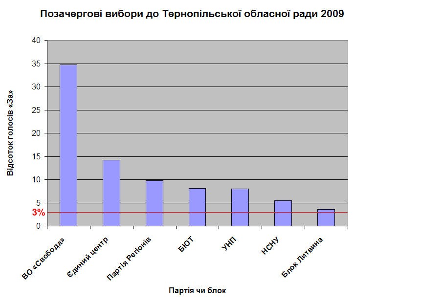 Результати позачергових виборів до Тернопільської обласної ради 2009 року.